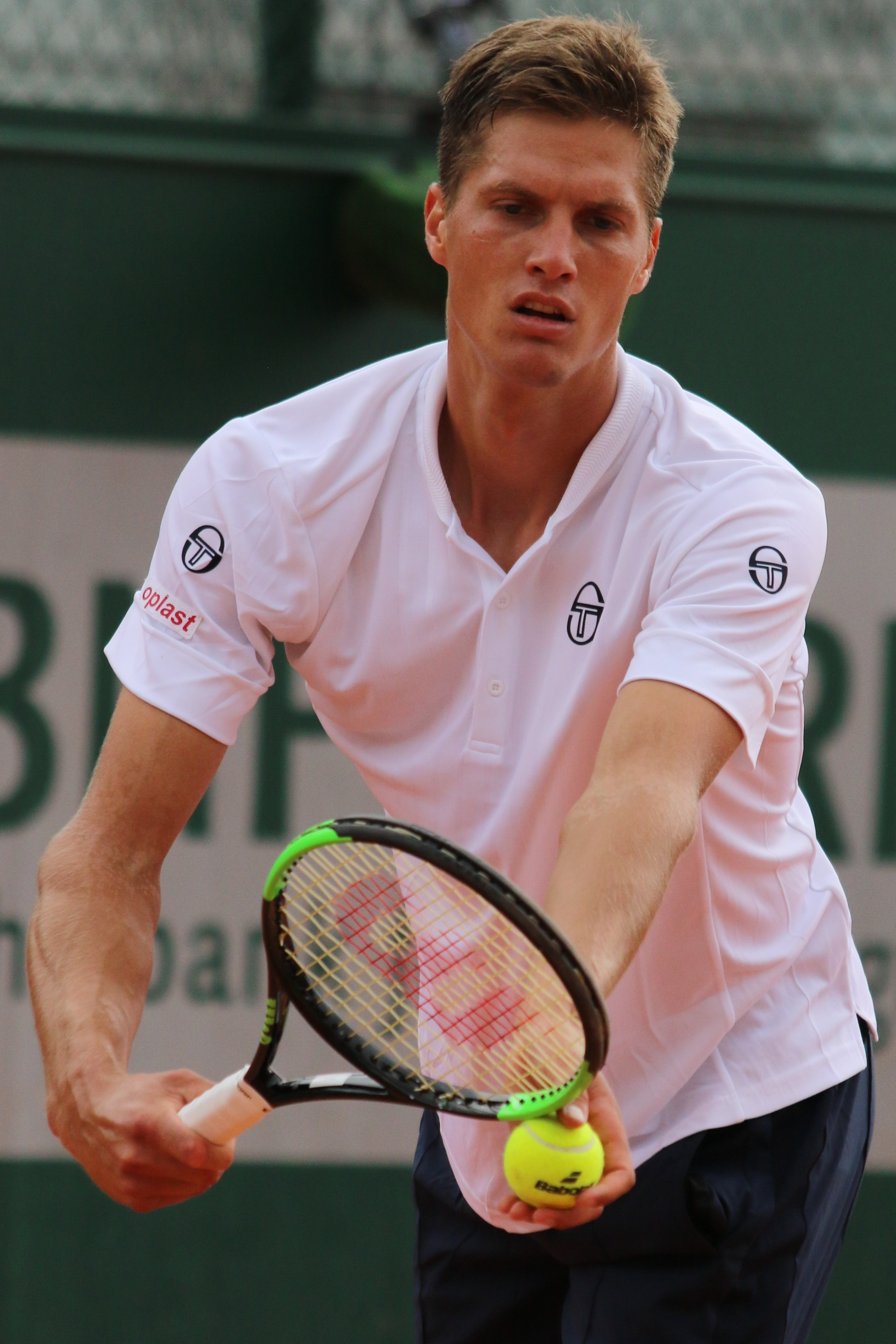 Serdarusic RGQ19 (10)